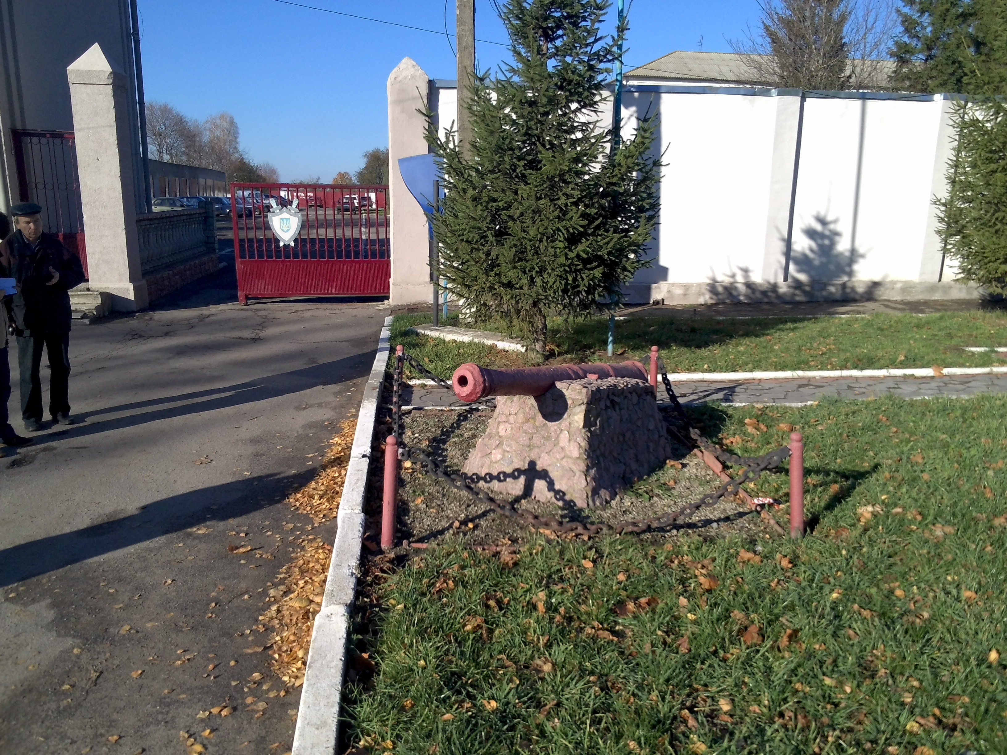 м. Липовець. Козацька гармата XVII ст.